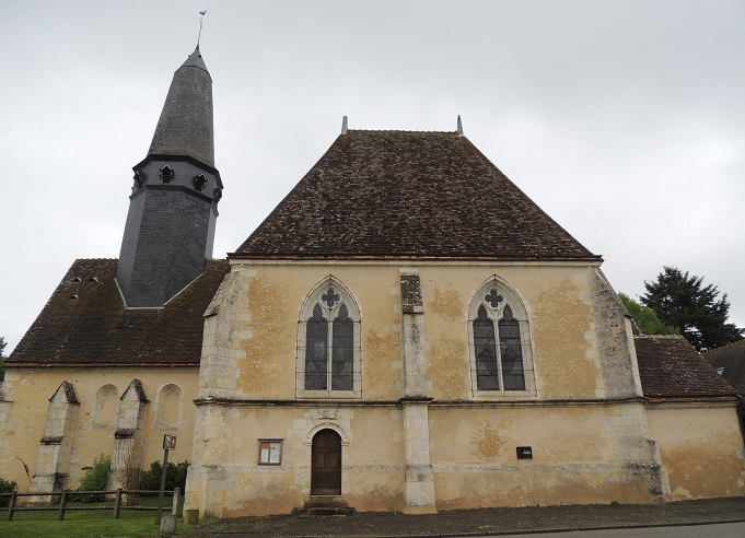 Église Saint-Thomas, façade Sud avec la flèche raccourcie et la chapelle dédiée à la sainte vierge aux proportions démesurées avec son magnifique portail de dimensions modestes mais aux sculptures fines